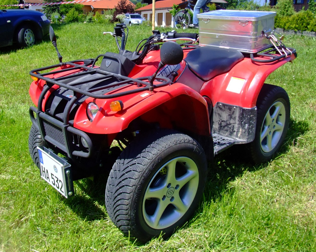 Yamaha Kodiak Ultramatic All-terrain vehicle